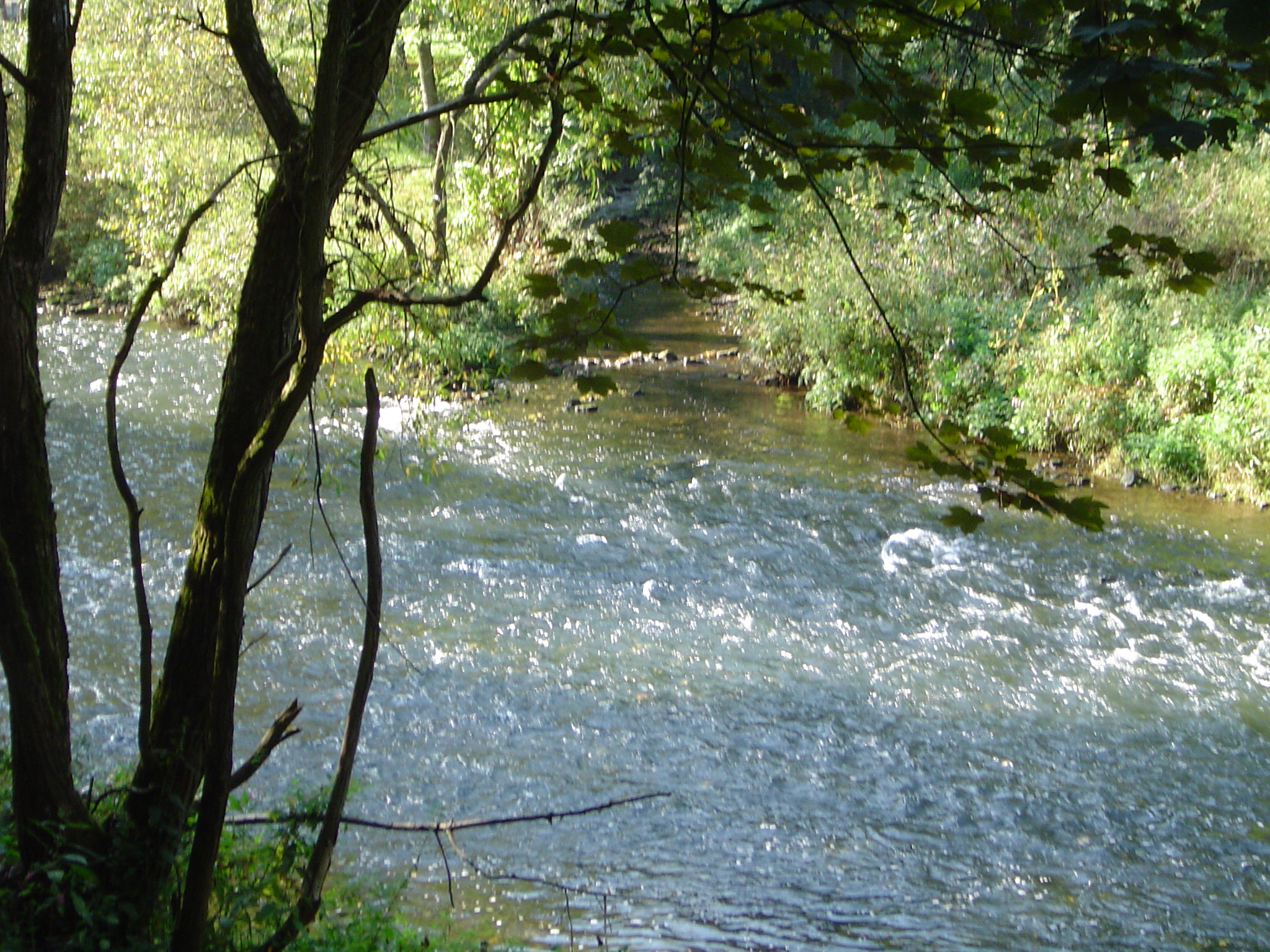 Wou d'Waark an d'Uelzecht leeft... (2005).